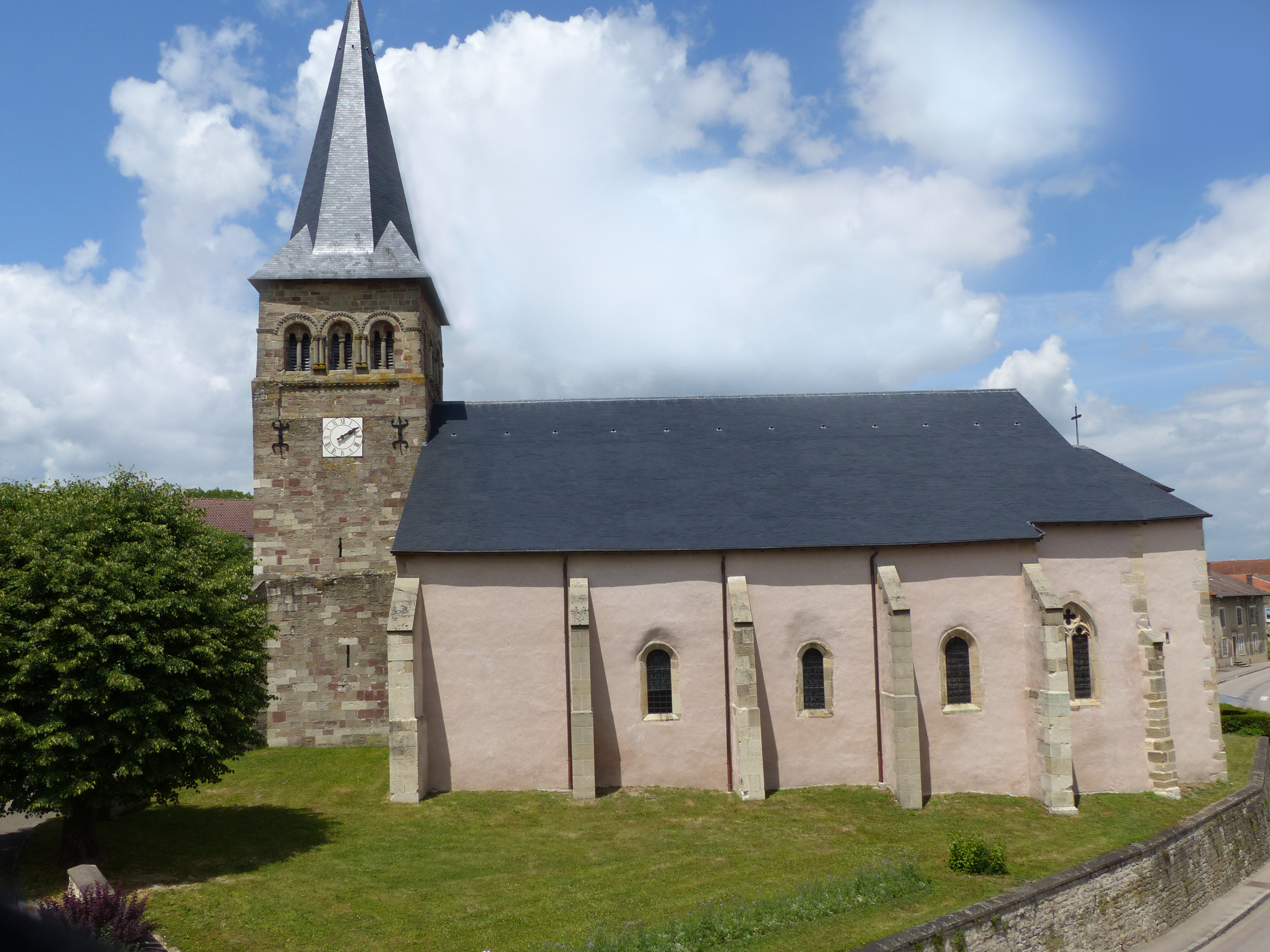 Monument classé